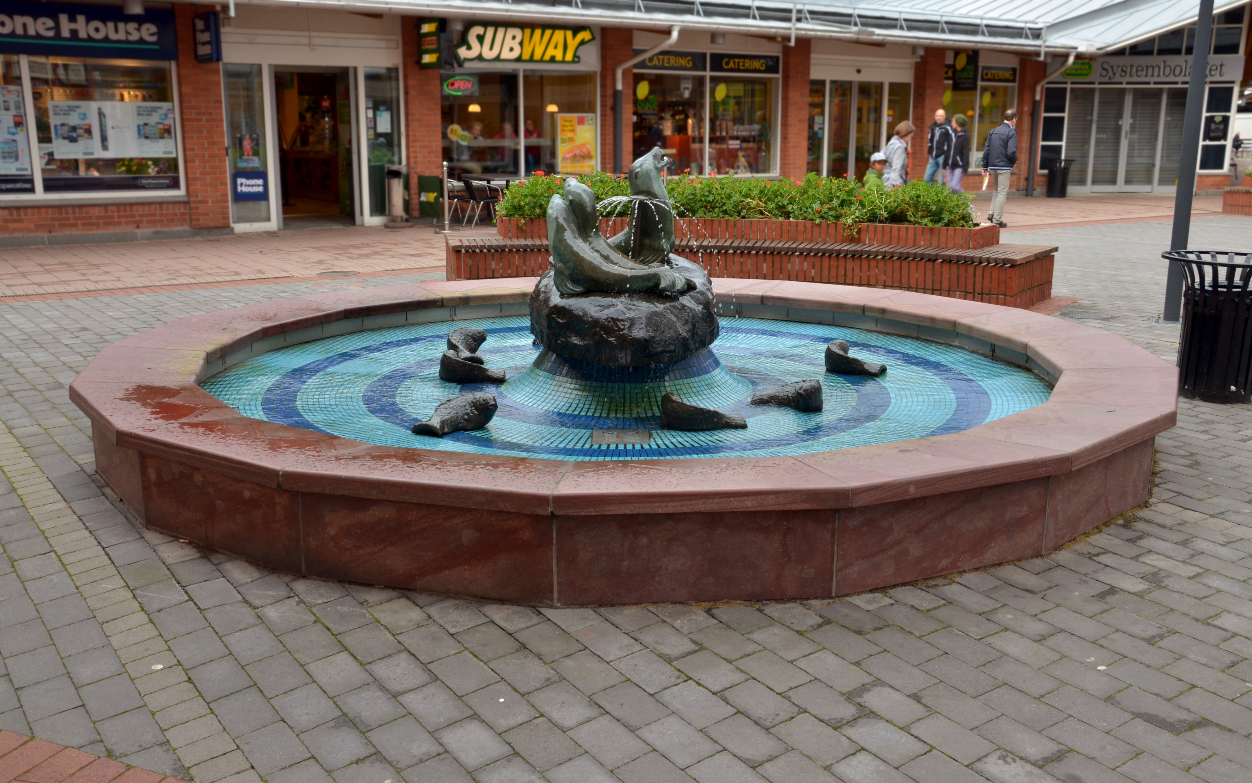 Vattenkonst av Dominico Ingannii Huddinge centrum.